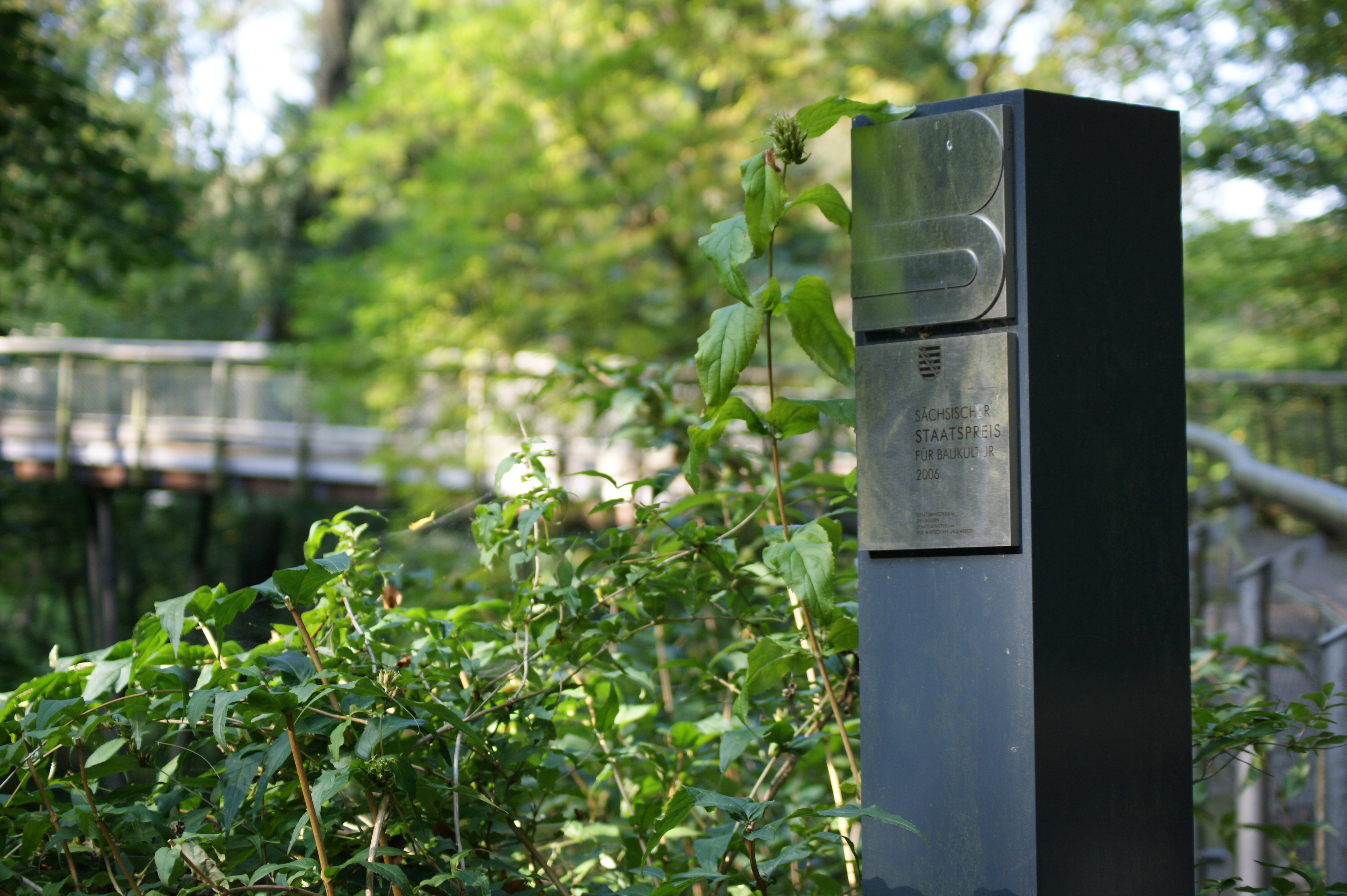 Tharandt, Forstbotanischer Garten (Landesarboretum): Zeisiggrundbrücke („Sächsischer Staatspreis für Baukultur 2006“)